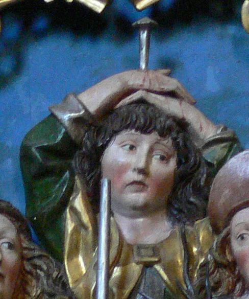 Heilsbronn, Landkreis Ansbach, Münster St. Marien und Jakobus Vierzehn-Nothelfer-Altar von 1498 Hl. Pantaleon